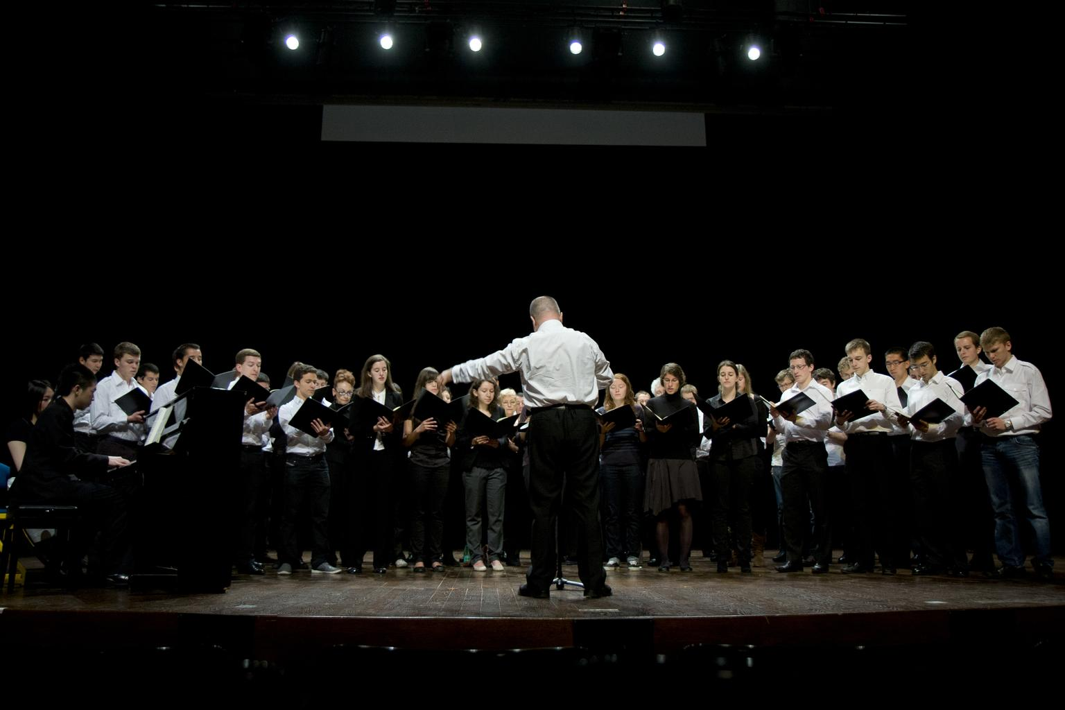 Campus de l'École polytechnique, ensemble vocal de l'École dans l'amphithéâtre Poincaré.